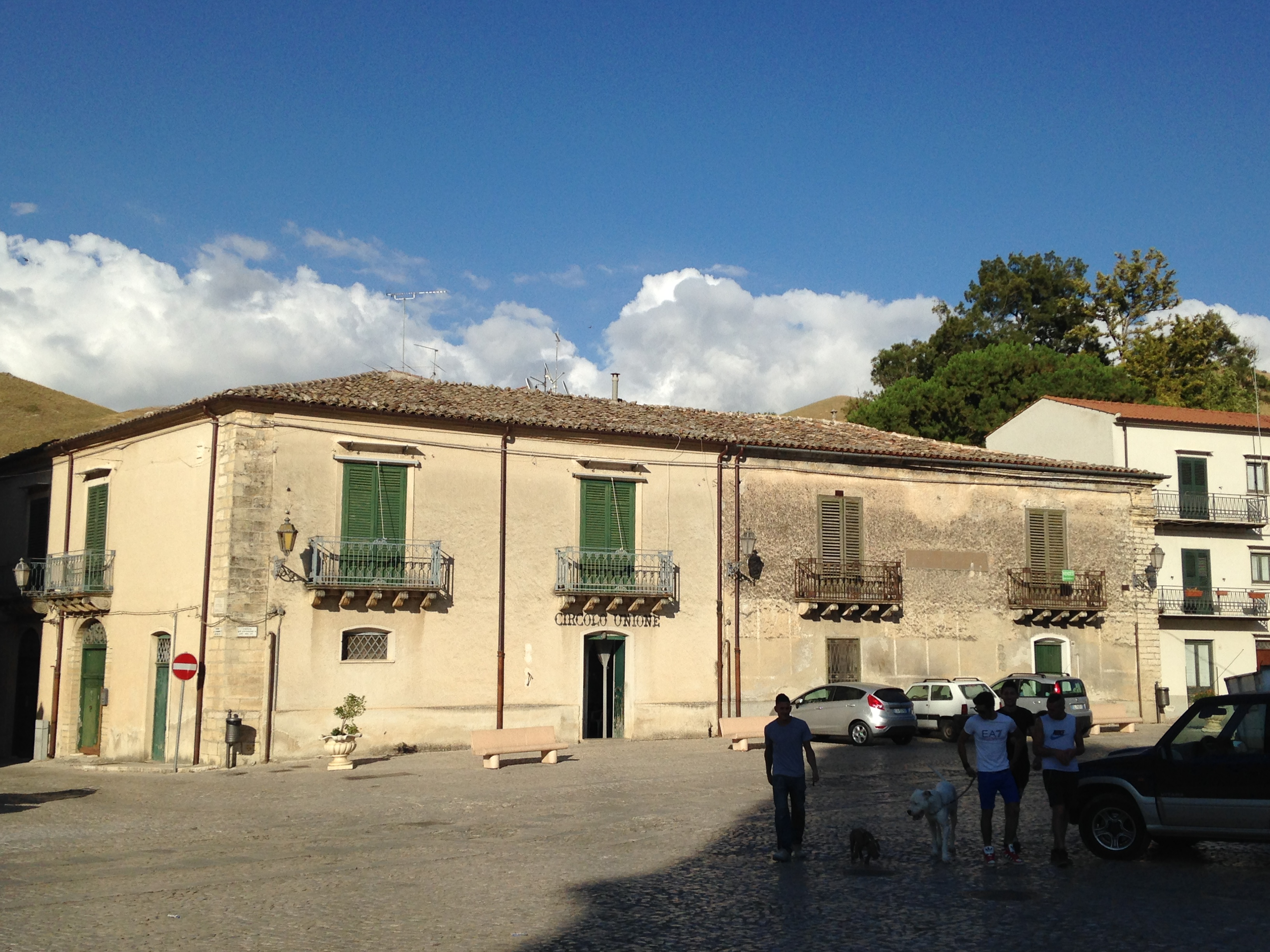 Palazzo barone Pietro Mancuso